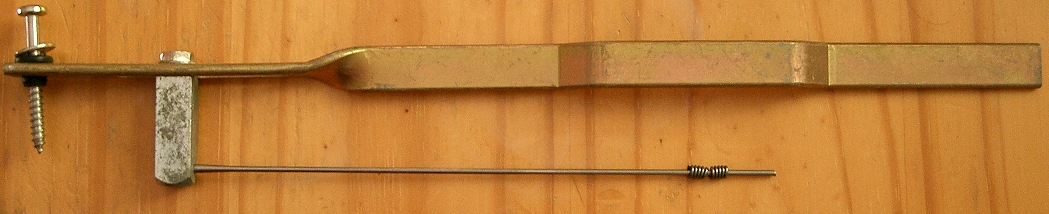 Objekt: Tonerzeuger eines Fender Rhodes